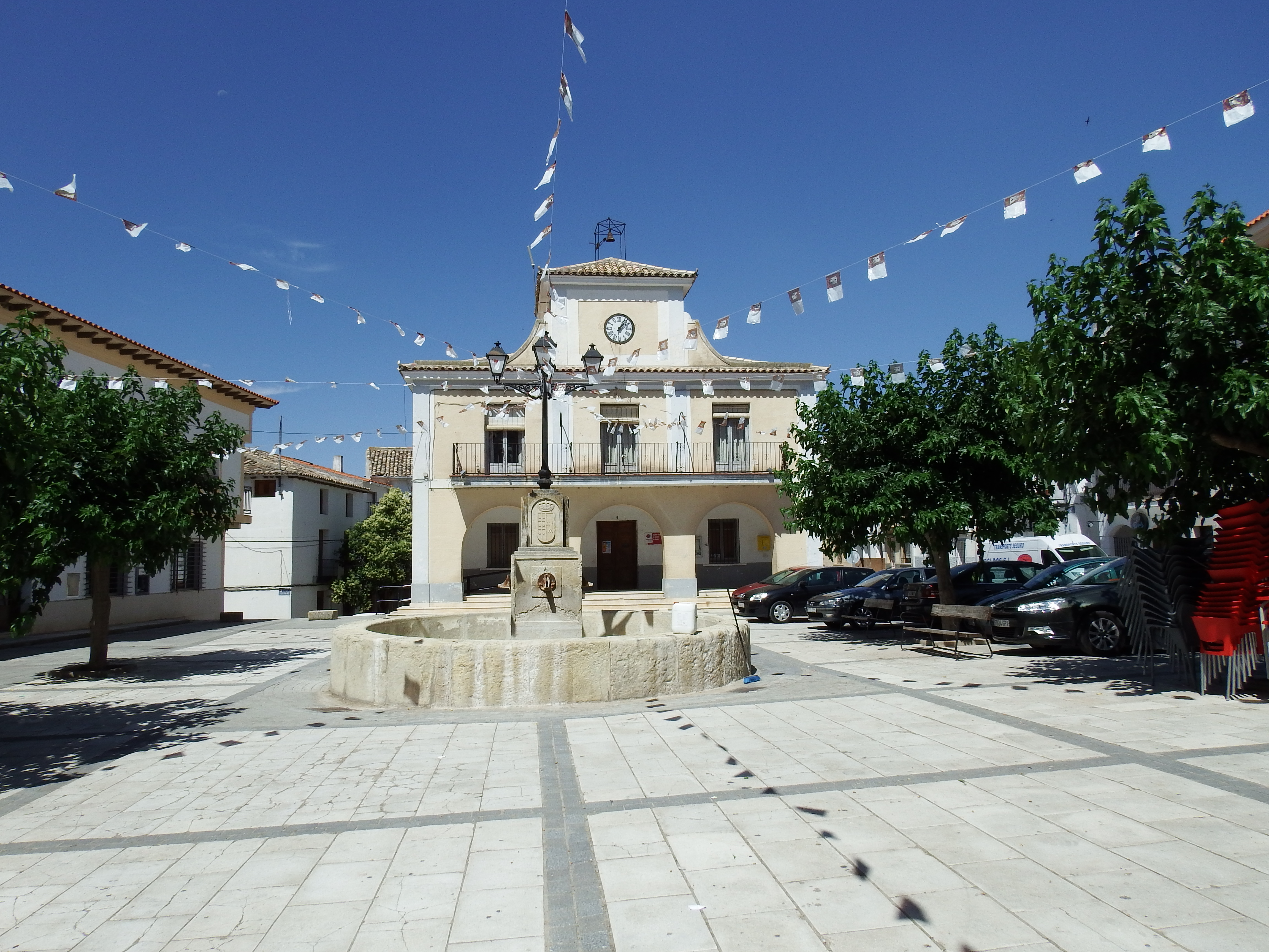 Barajas de Melo. Plaza del pueblo.